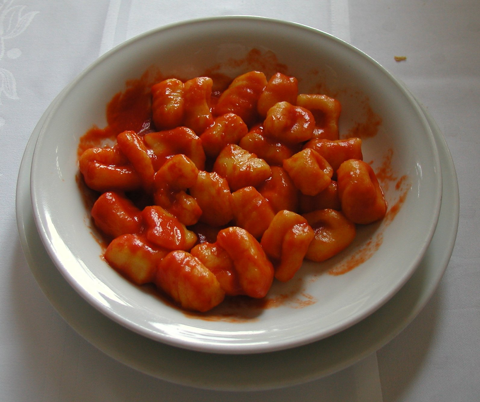 Gnocchi al sugo di pomodoro